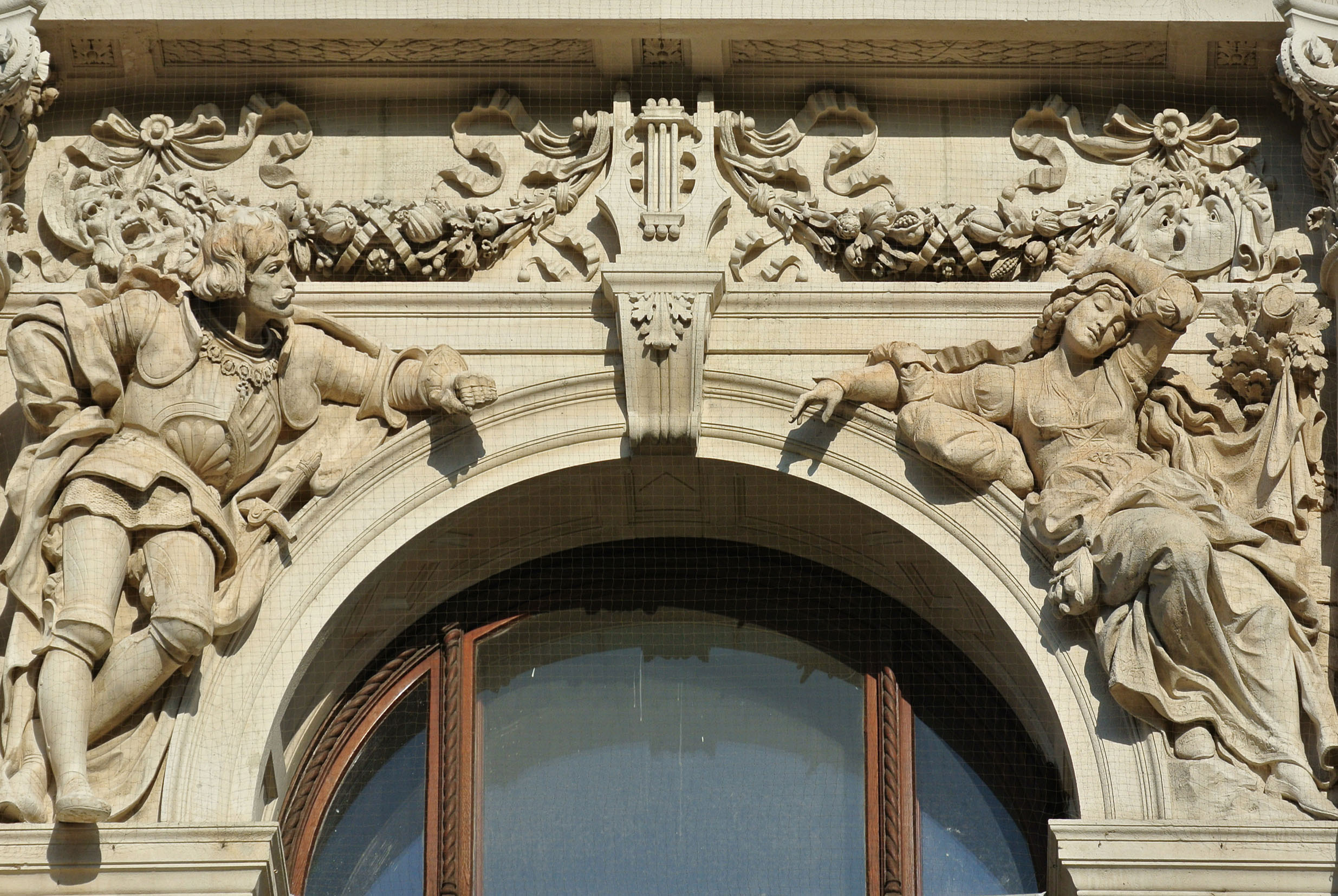 Viktor Tilgner (*25.10.1844 in Preßburg, † 16.4.1896 in Wien) Bildhauer,schuf das Zwickelfigurenpaar - Käthchen v. Heilbronn und Graf Wetter.